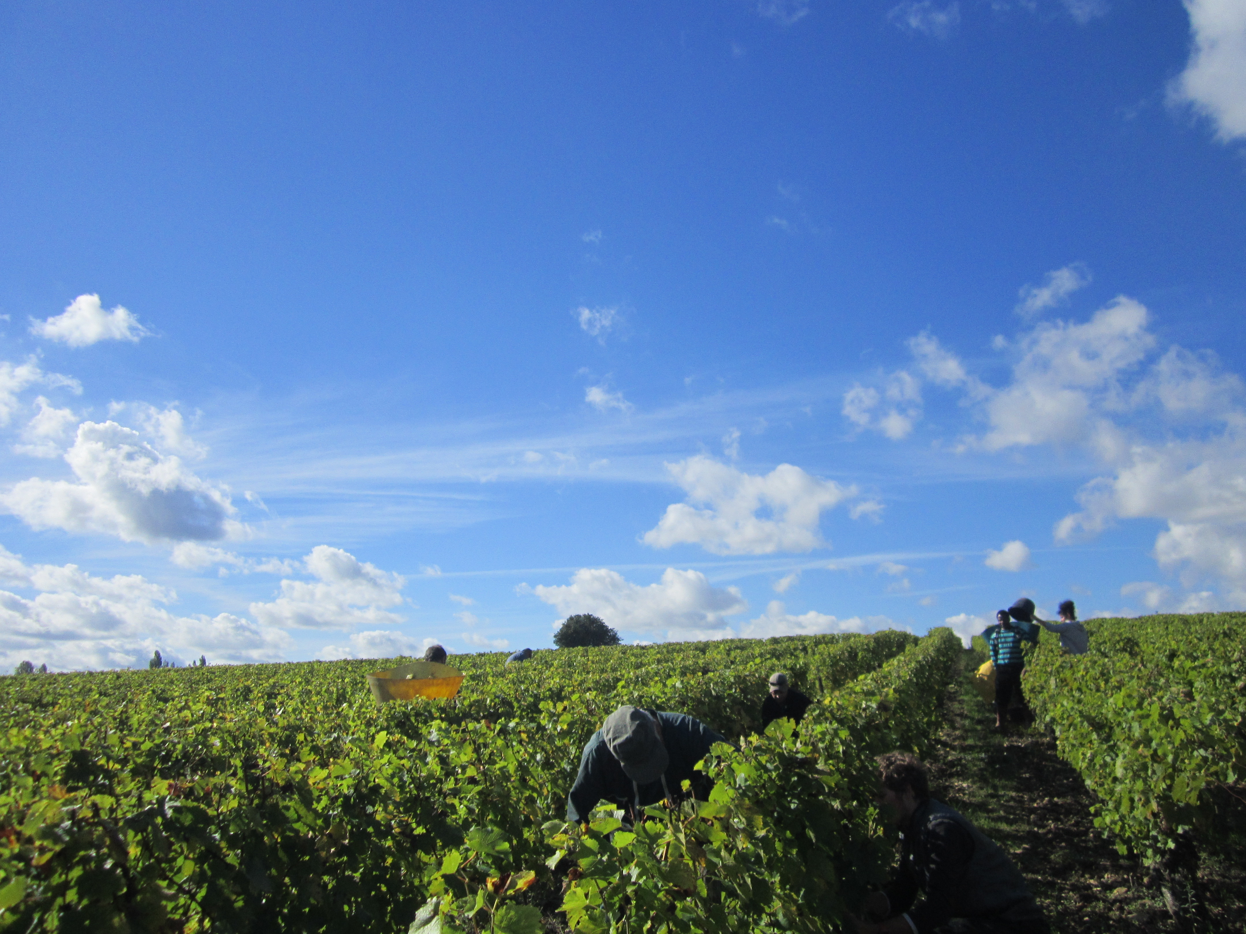 Photographie des vendanges chez François PINON à Vouvray